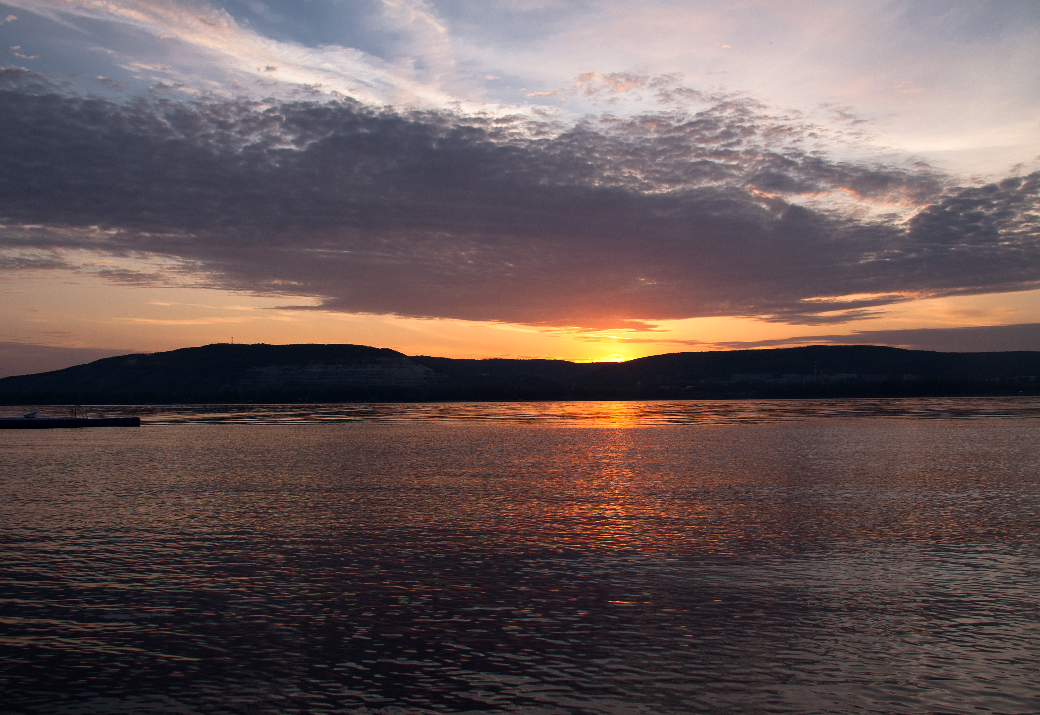 Рассвет на Волге. Село Гаврилова поляна.